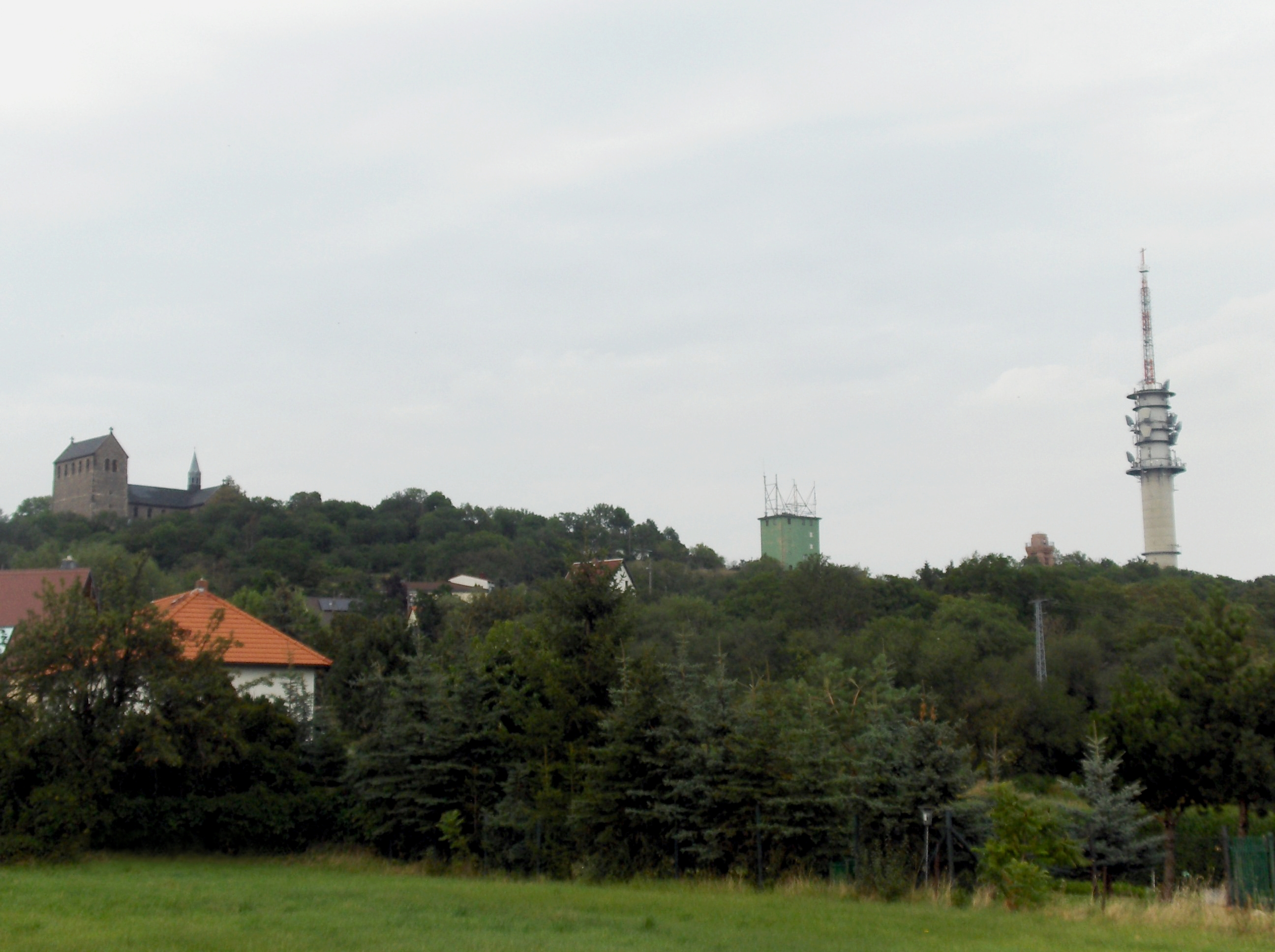 Petersberg aus Südwest